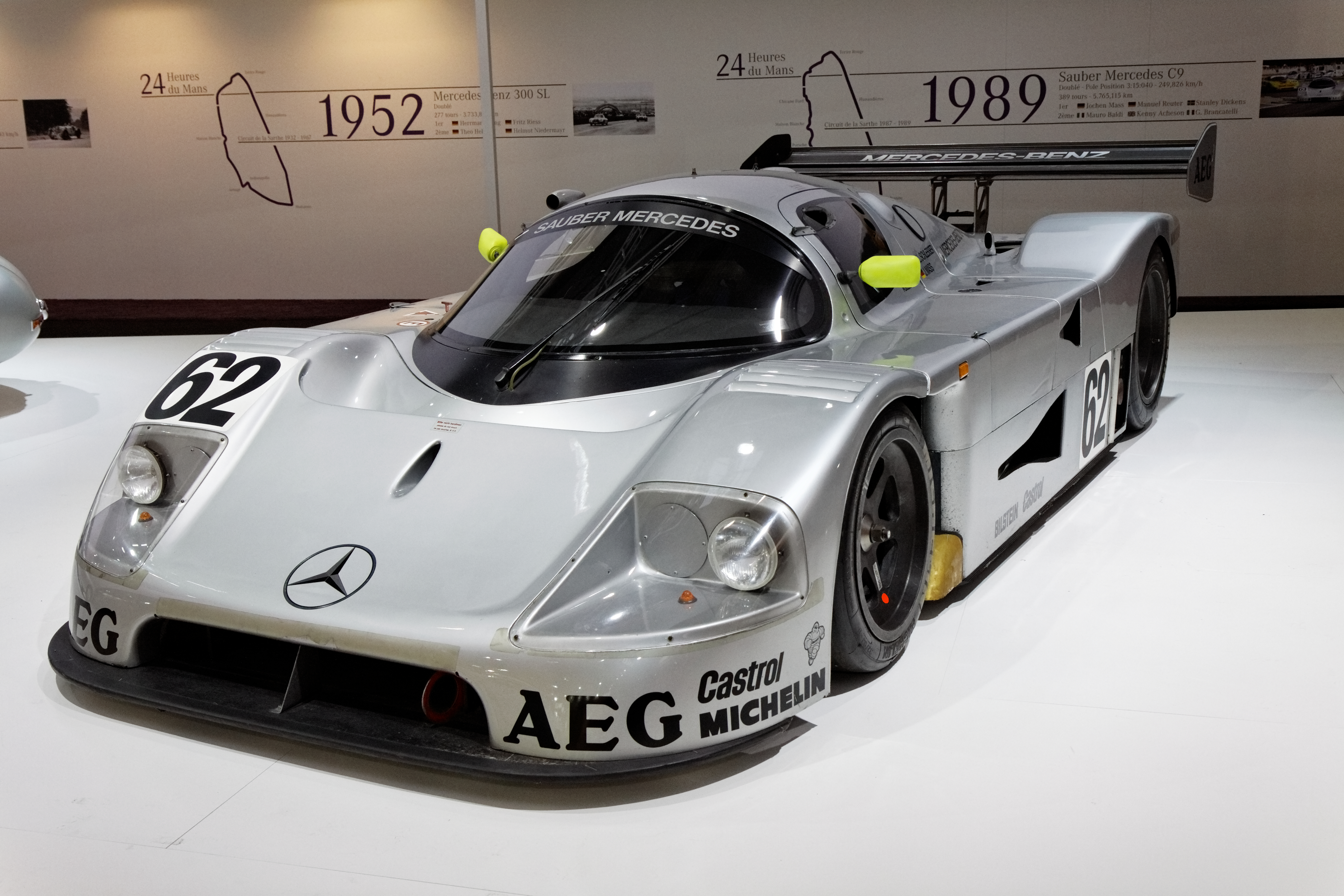 Sauber Mercedes C9